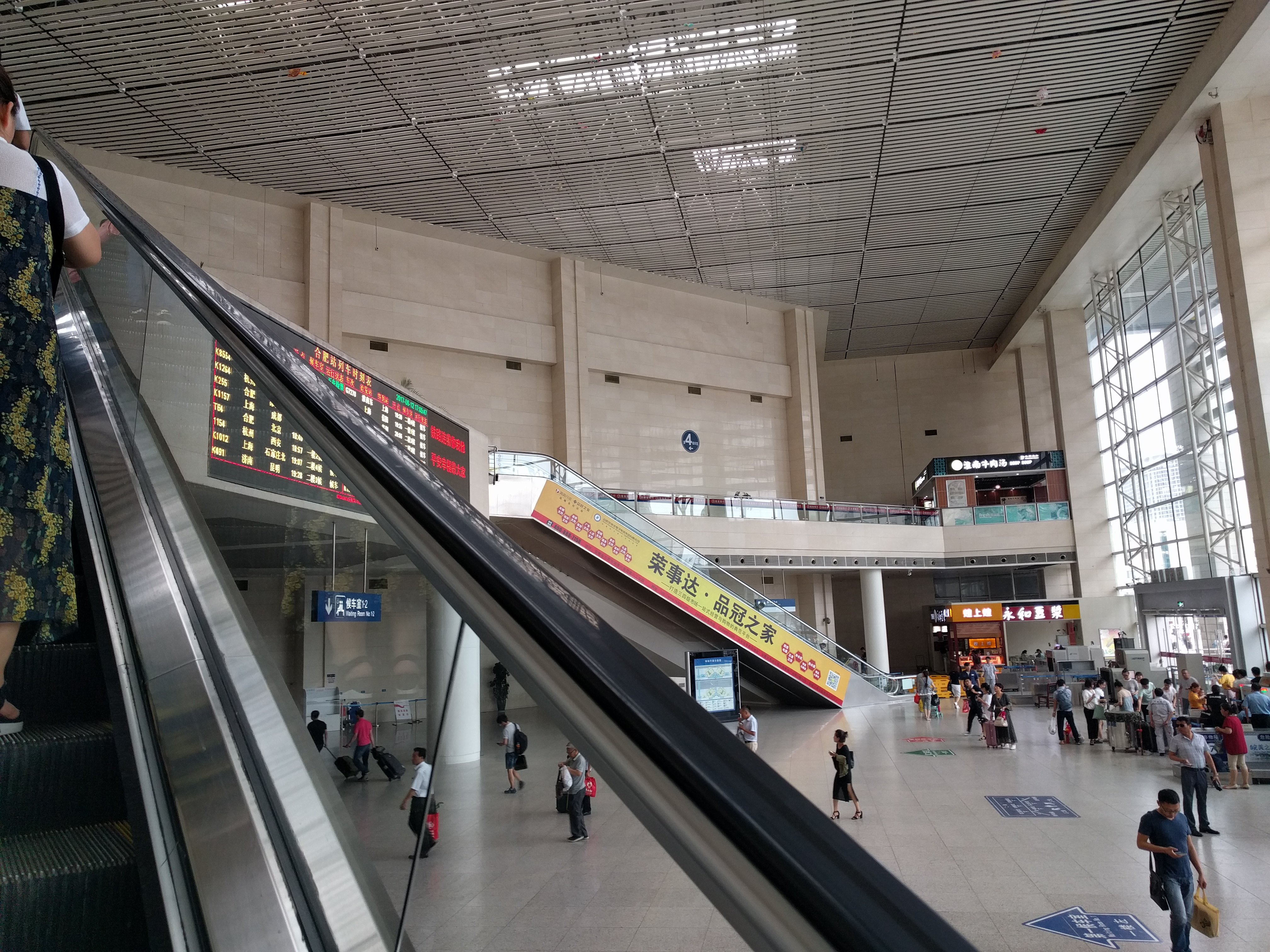 合肥南站大厅